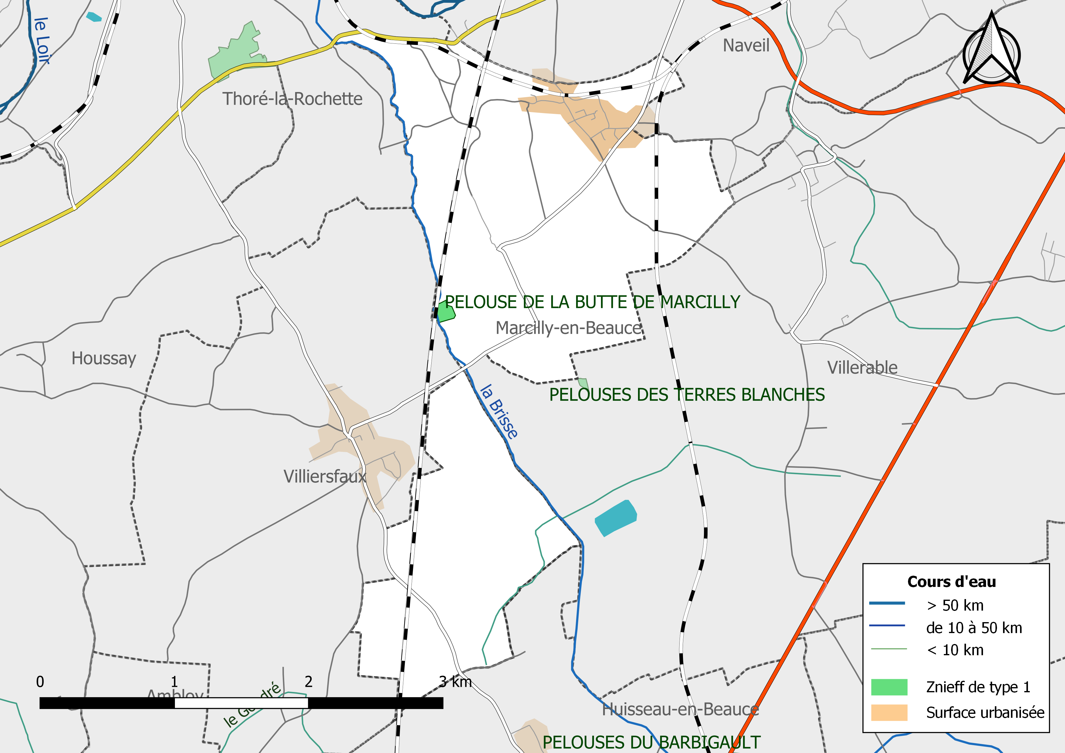 Zones naturelles d'intérêt écologique faunistique et Floristique (ZNIEFF) de type 1 de la commune de Marcilly-en-Beauce. (Loir-et-Cher, France).